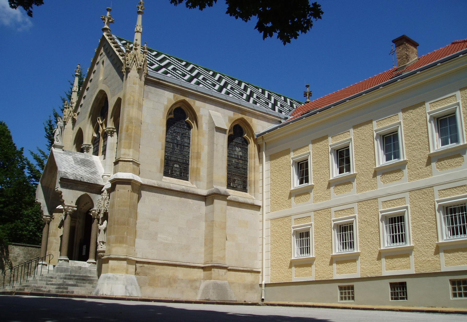 Mayerling Karmelkloster und Kirche.